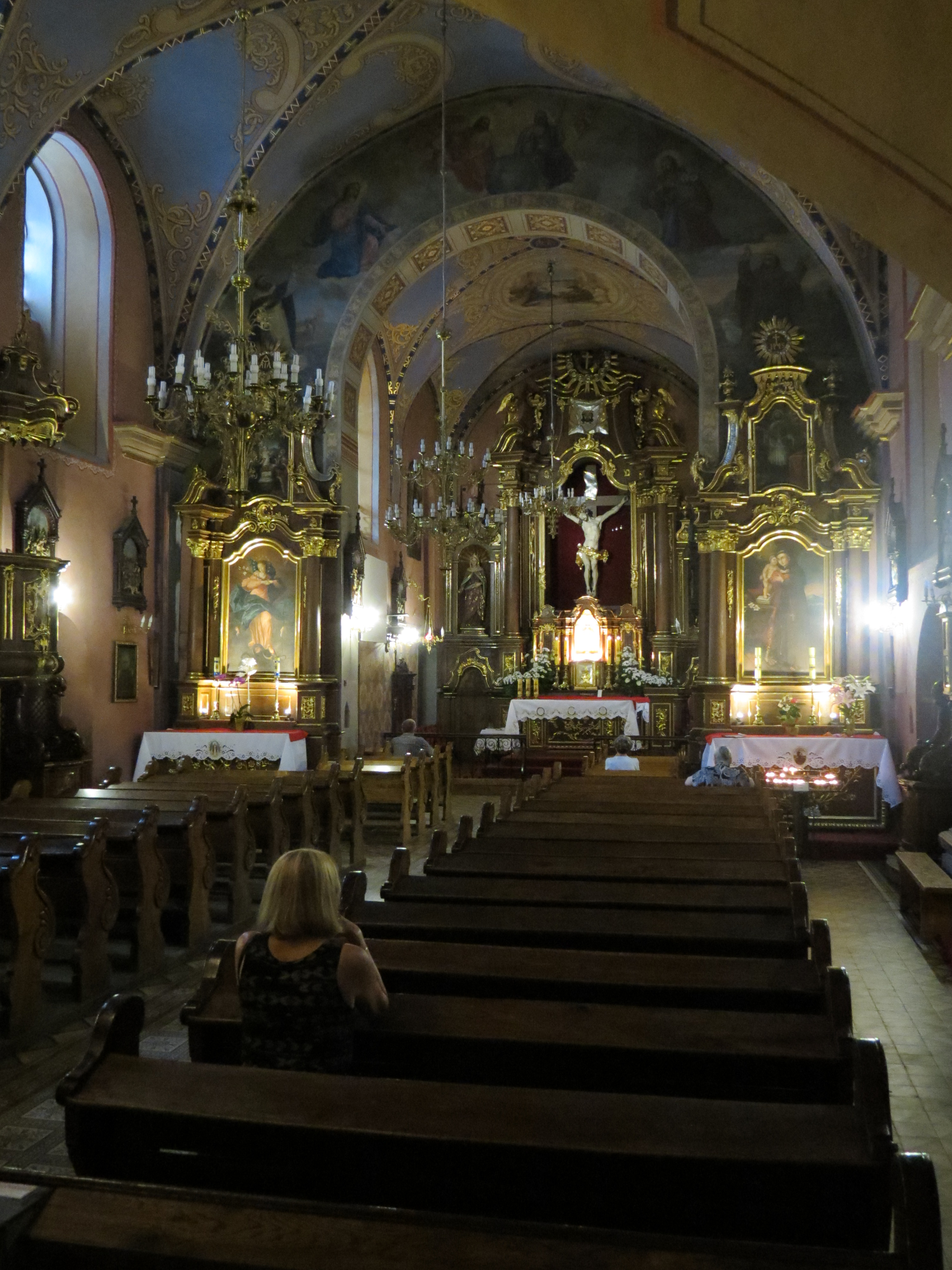 Przemyśl, kościół p.w. św. Antoniego, 1637-1645, 1870, 1909